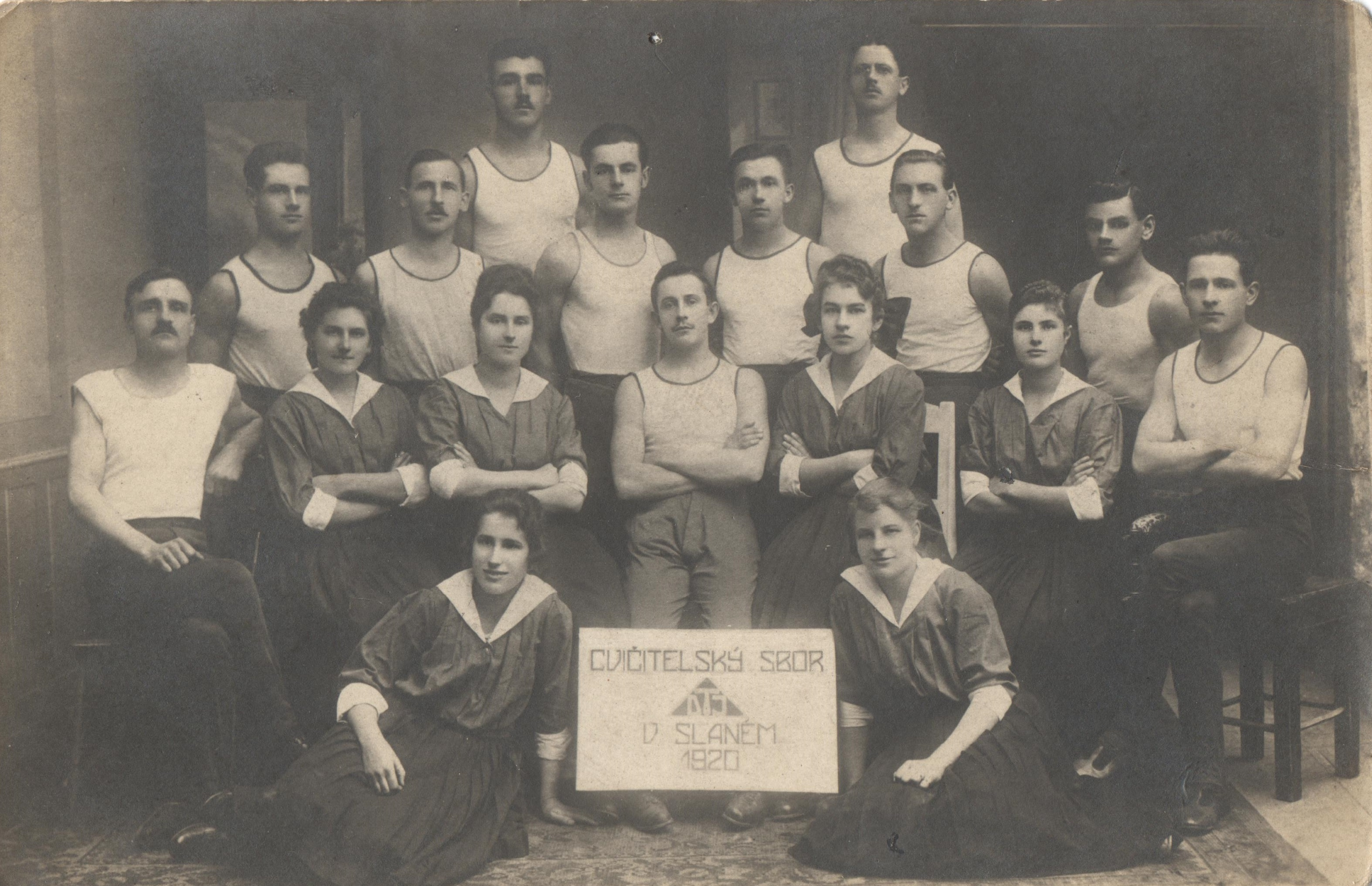 Josef Sušánek jako člen Dělnické tělocvičné jednoty v roce 1920.